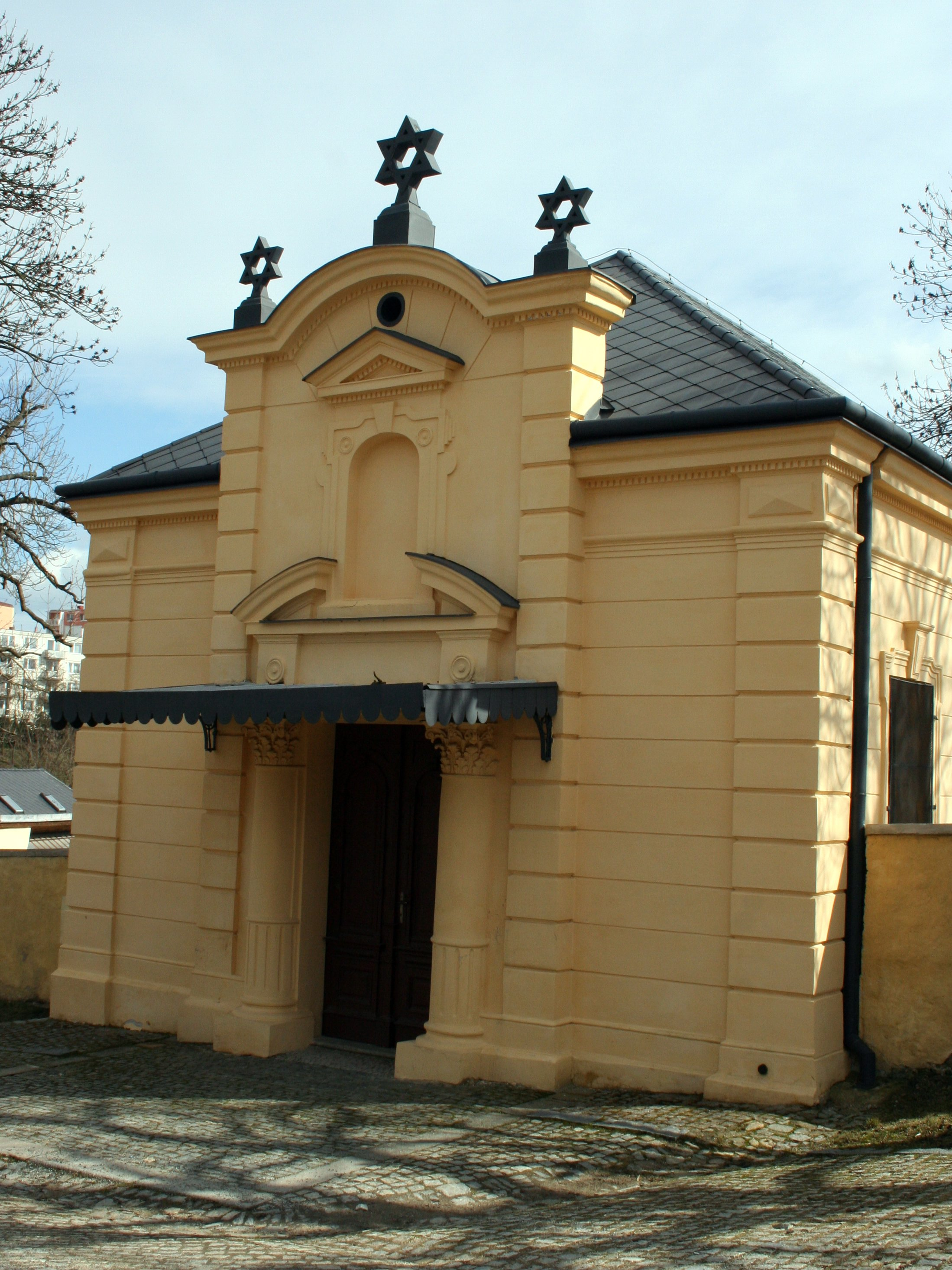 Třebíč Jewish Cemetery